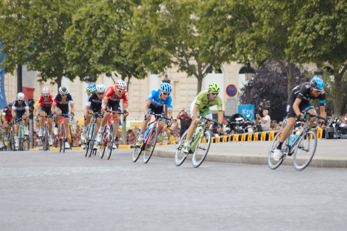 21è étape du Tour de France 2014, Evry-Paris Champs Elysées, photo prise à Paris au pied de l'Arc de Triomphe.